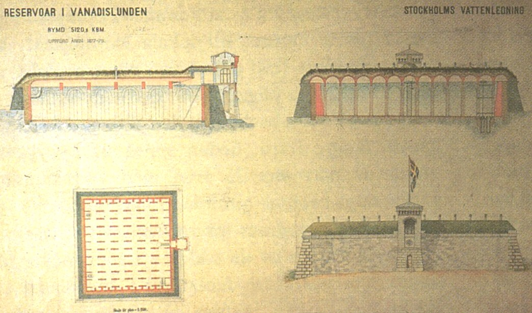 Vanadislundens gamla vattenreservoar, plan, fasad och sektioner